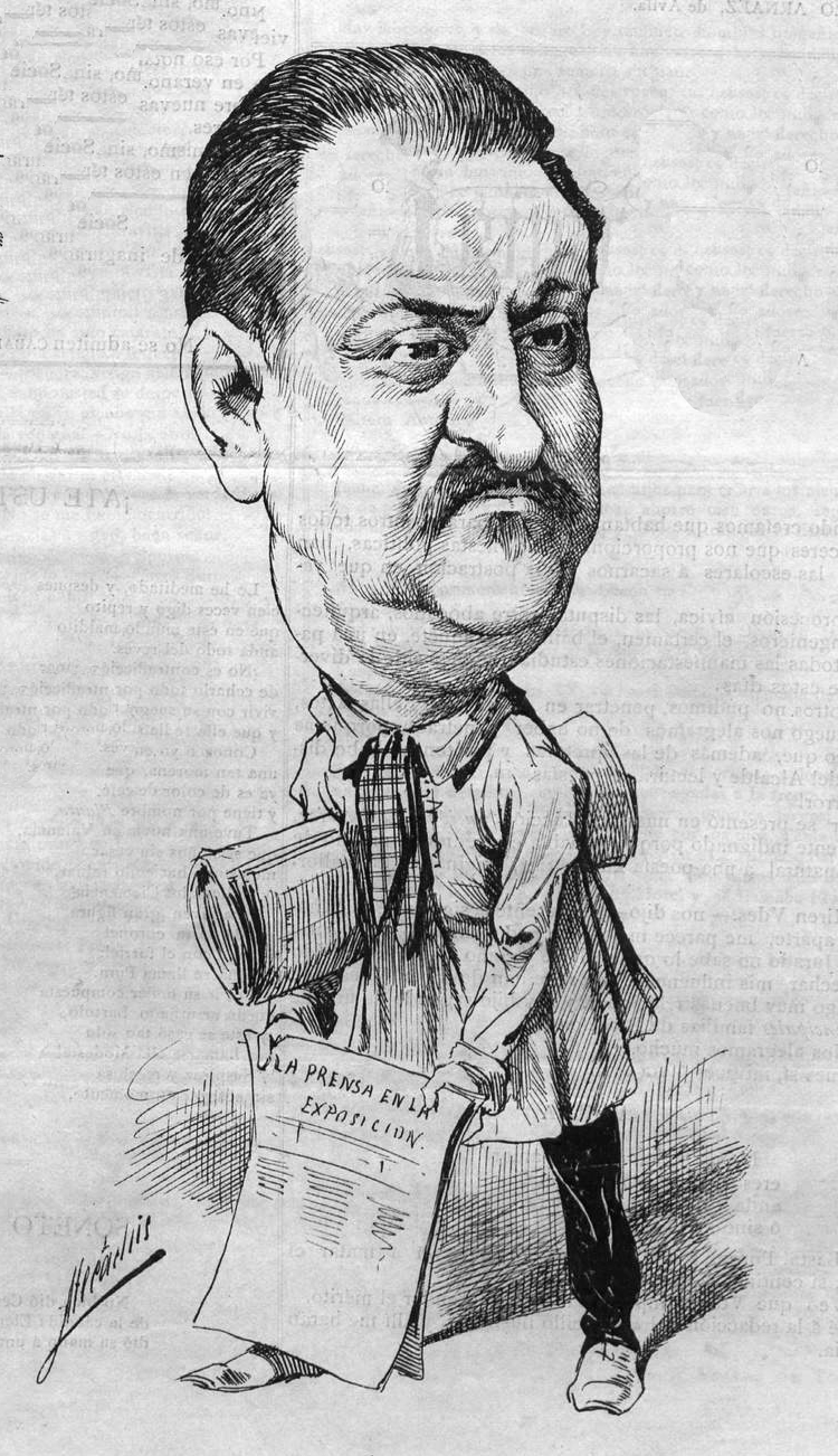 Juan Valero de Tornos.